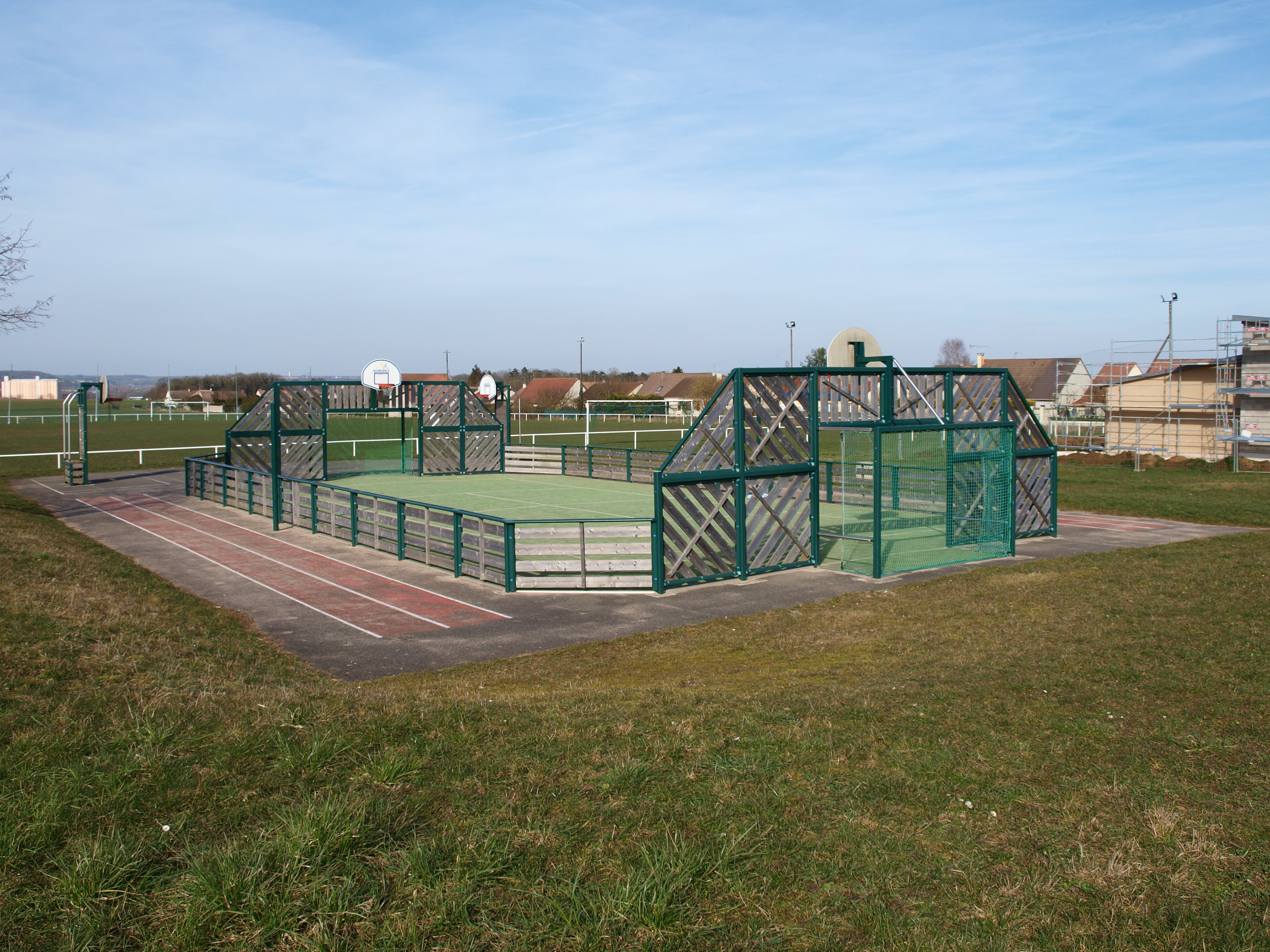 Esmans (Seine-et-Marne, France)